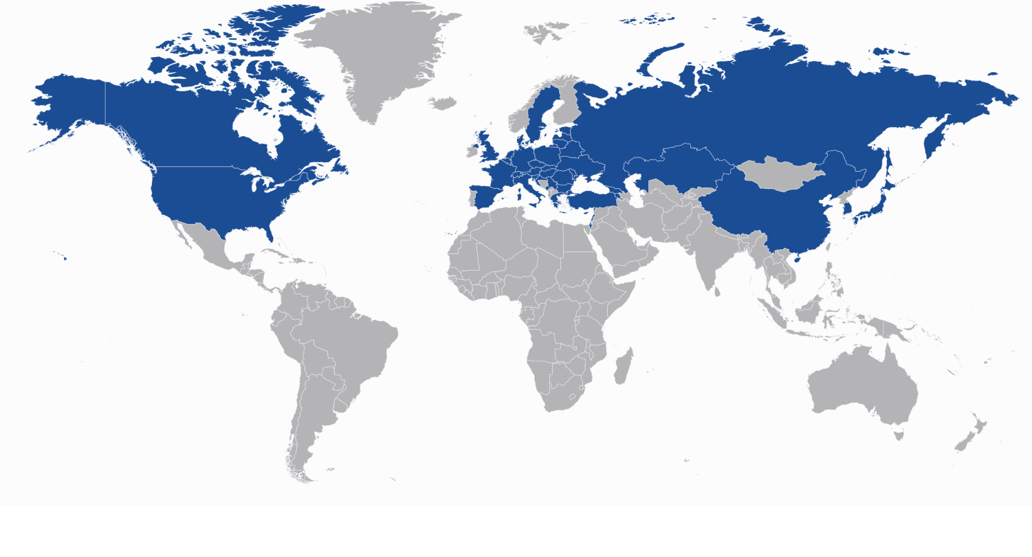 Mapa połączeń LOT